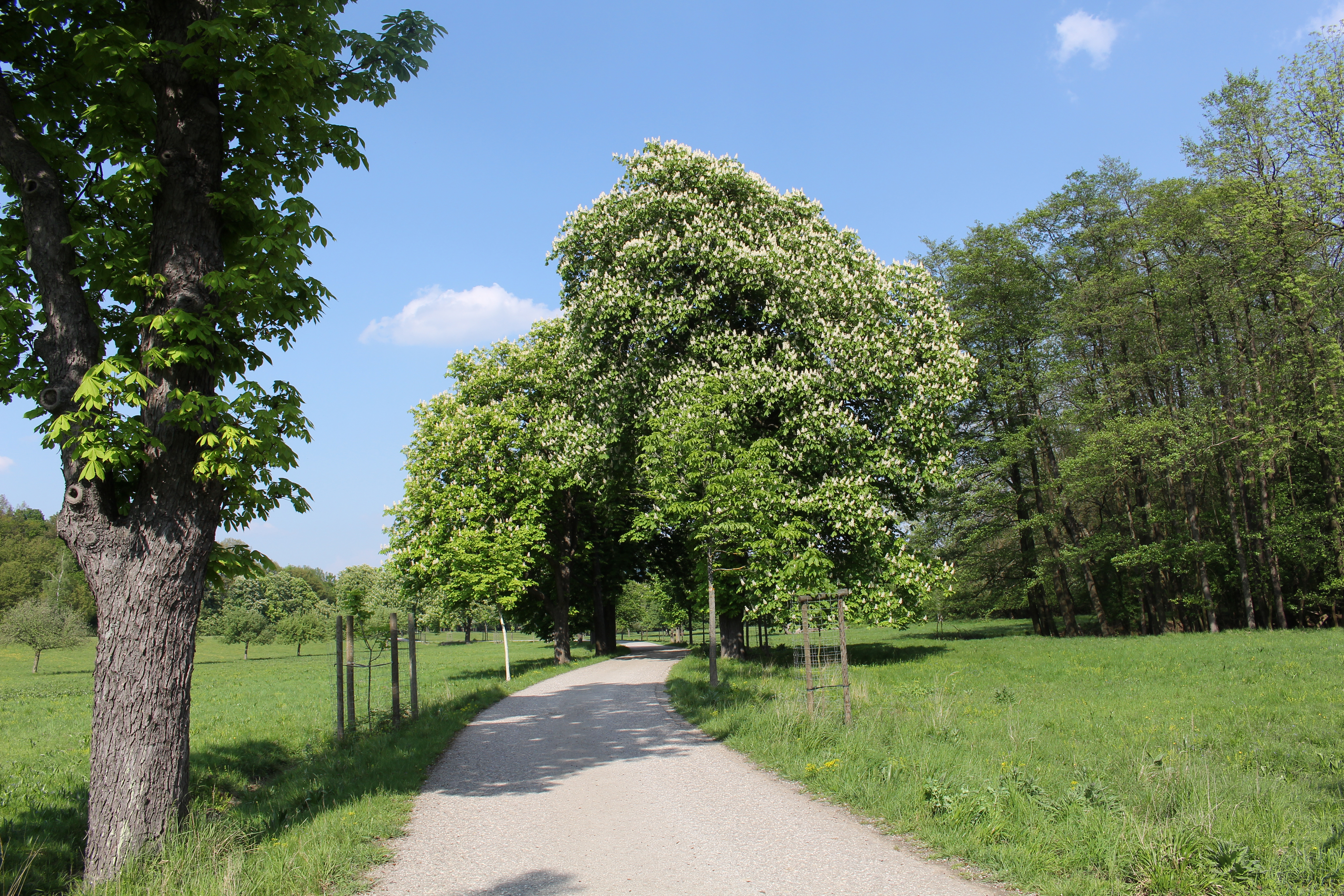 Weg über die Bischofswiese im Lainzer Tiergarten This media shows the nature reserve in Vienna with the ID 1.